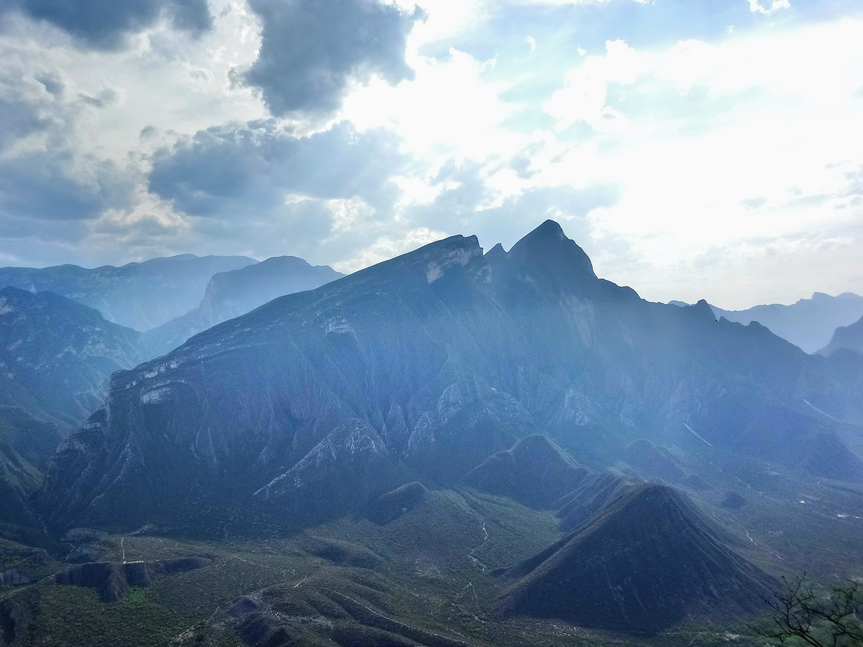 Pico del Gavilán desde pico Morteros